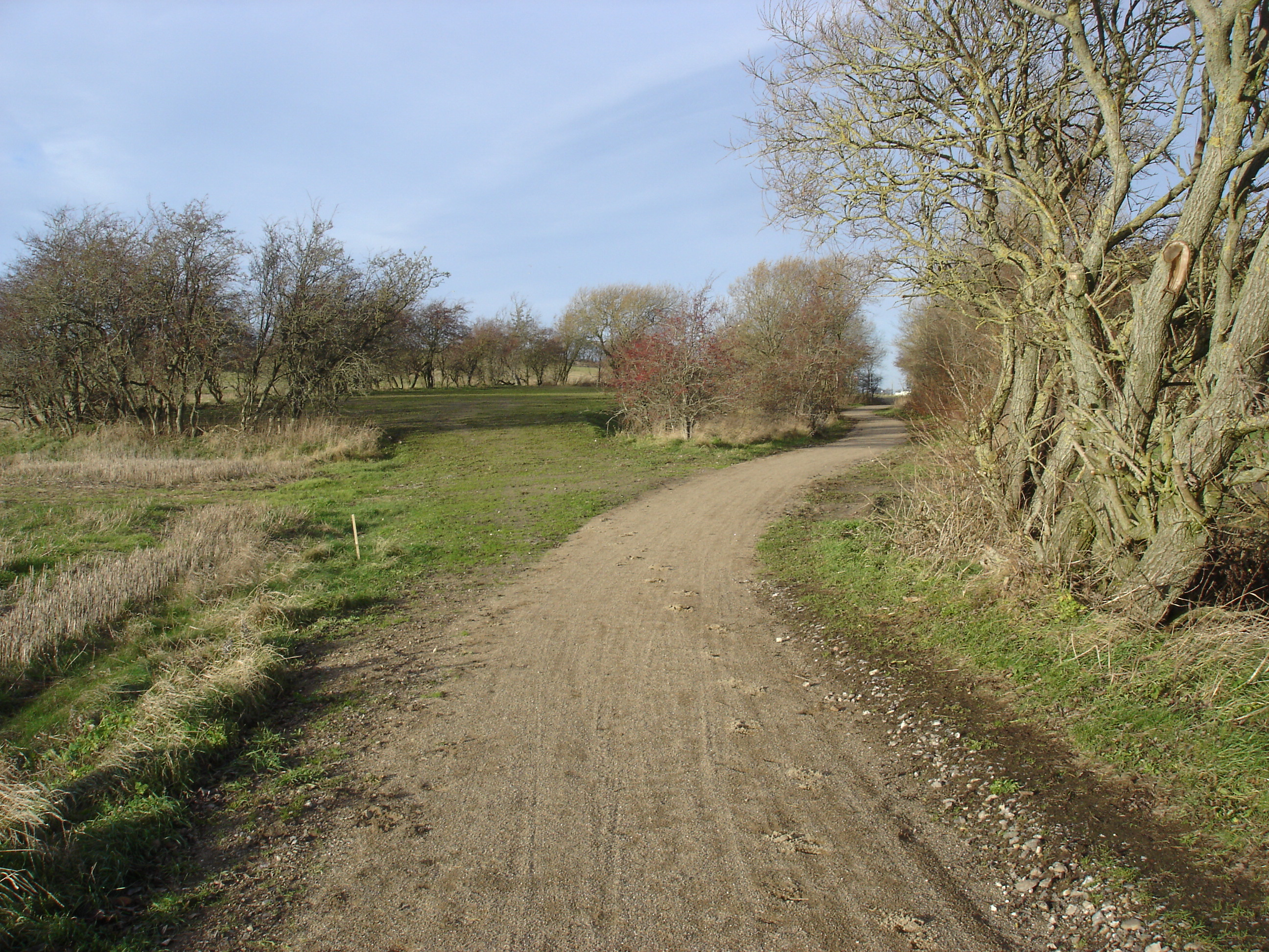 Ved Tostrup trinbræt svinger Bjergbanestien højre om banetracéet, der går inde i krattet